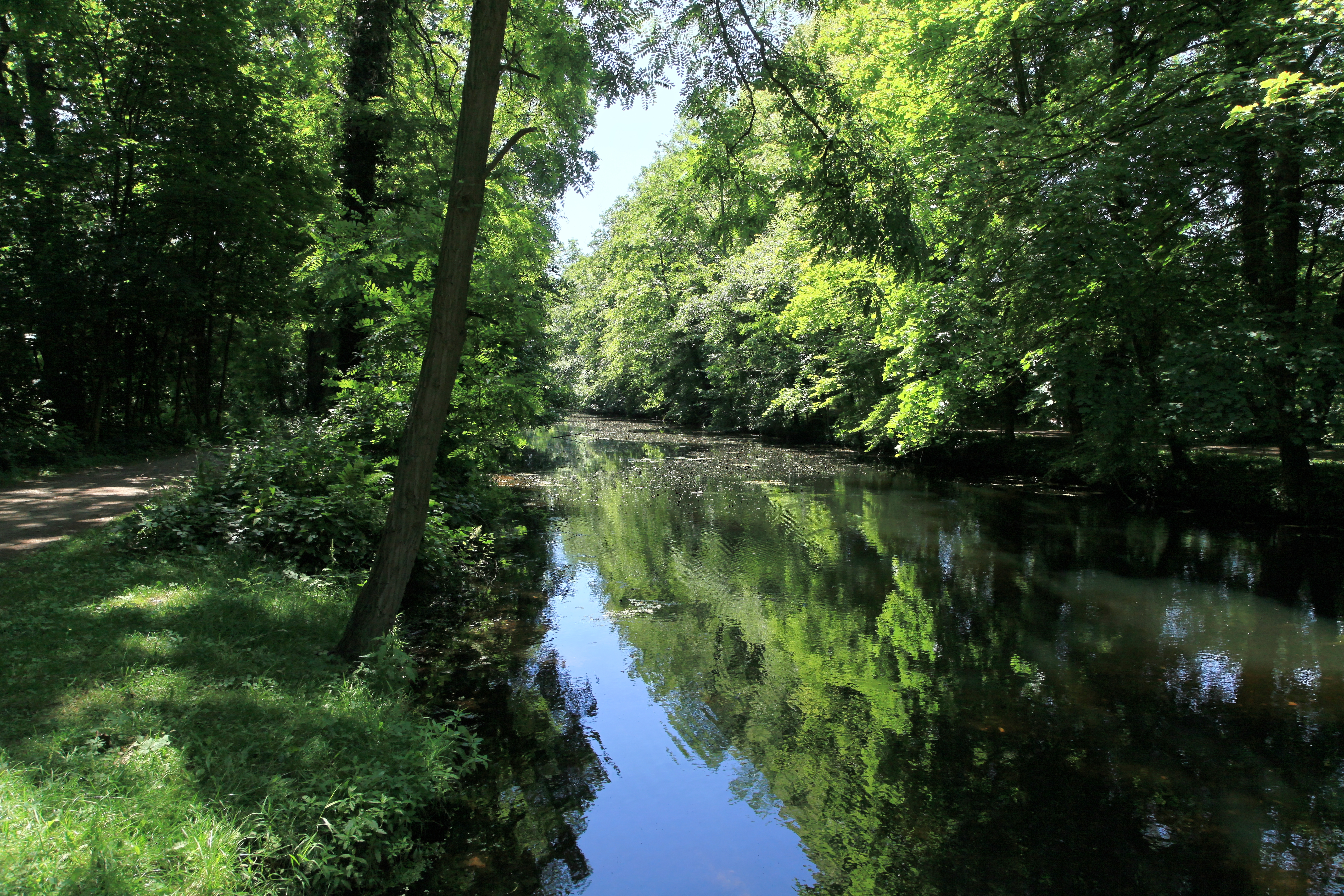 Ems-Hase-Kanal im Park an der Koppelschleuse, An der Koppelschleuse in Meppen